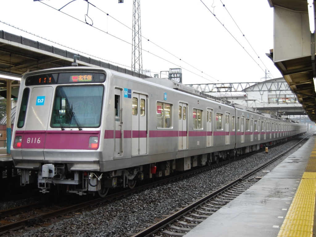 帝都高速度交通営団（現 東京メトロ）8000系電車8116編成・東急田園都市線内での輸送障害により「急行北千住ゆき」としての運用（2008/10/24・せんげん台にて撮影）